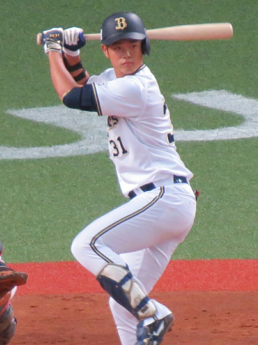 太田椋20190920